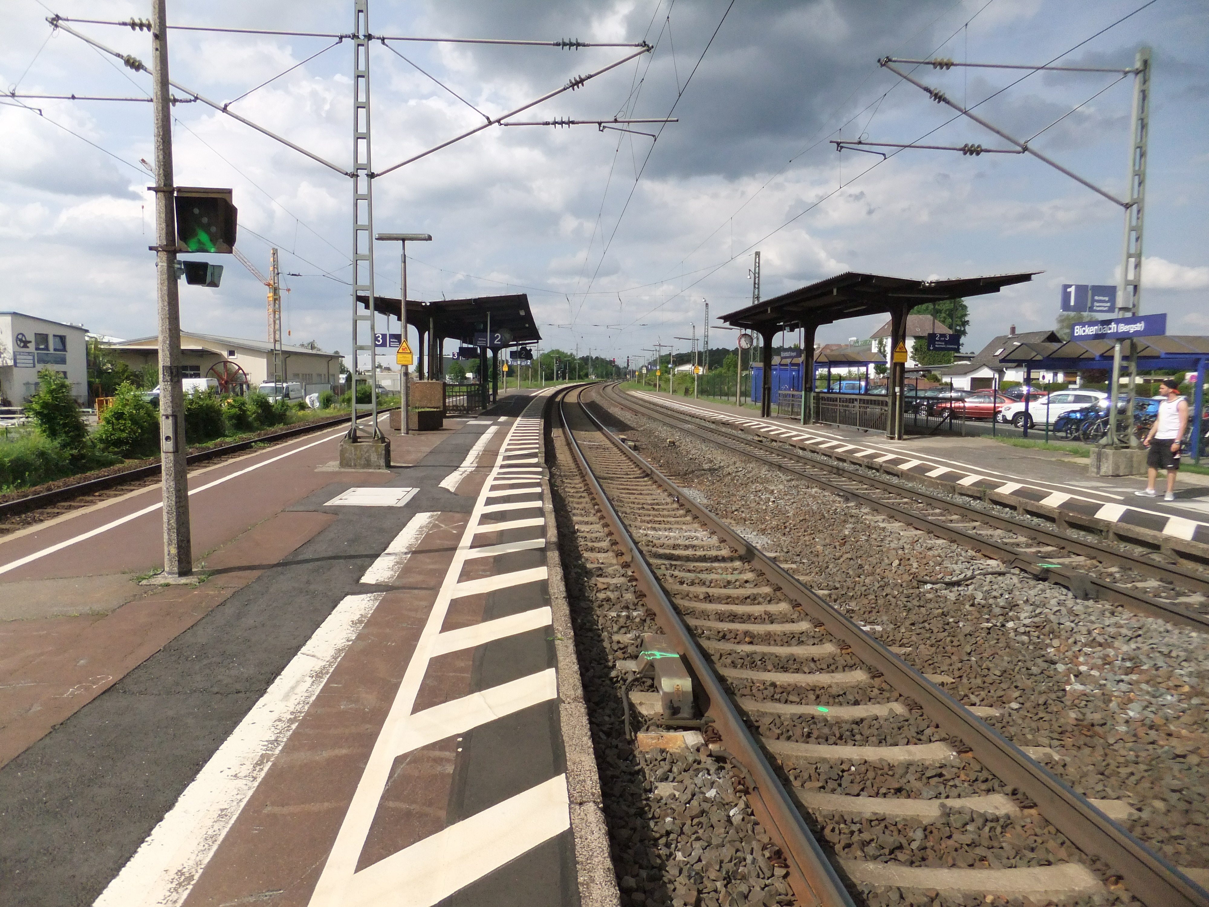 Die Bahnsteige des Bickenbacher (Bergstraße) Bahnhofs